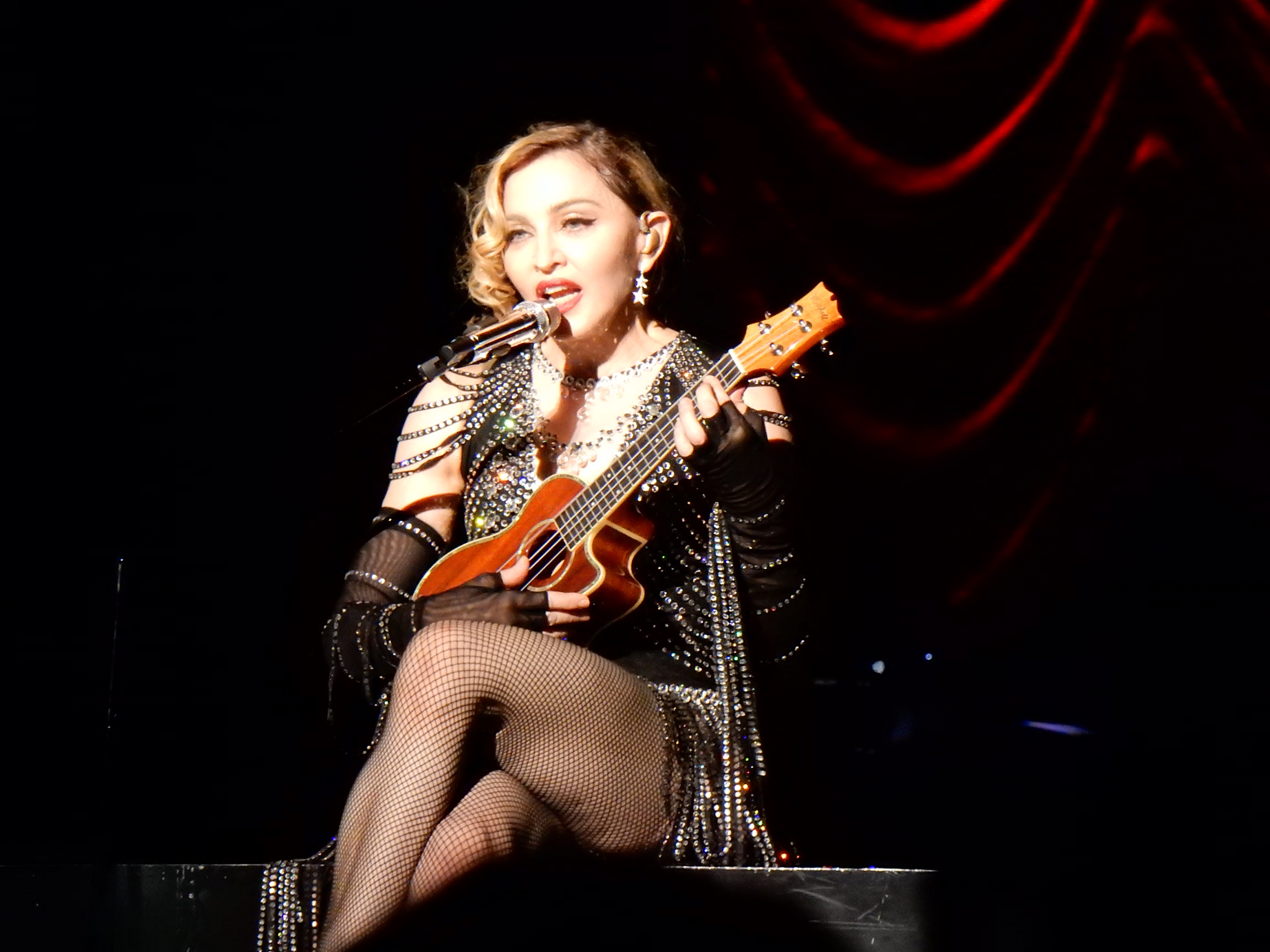 Madonna - Rebel Heart Toru 2015 - Prague 1